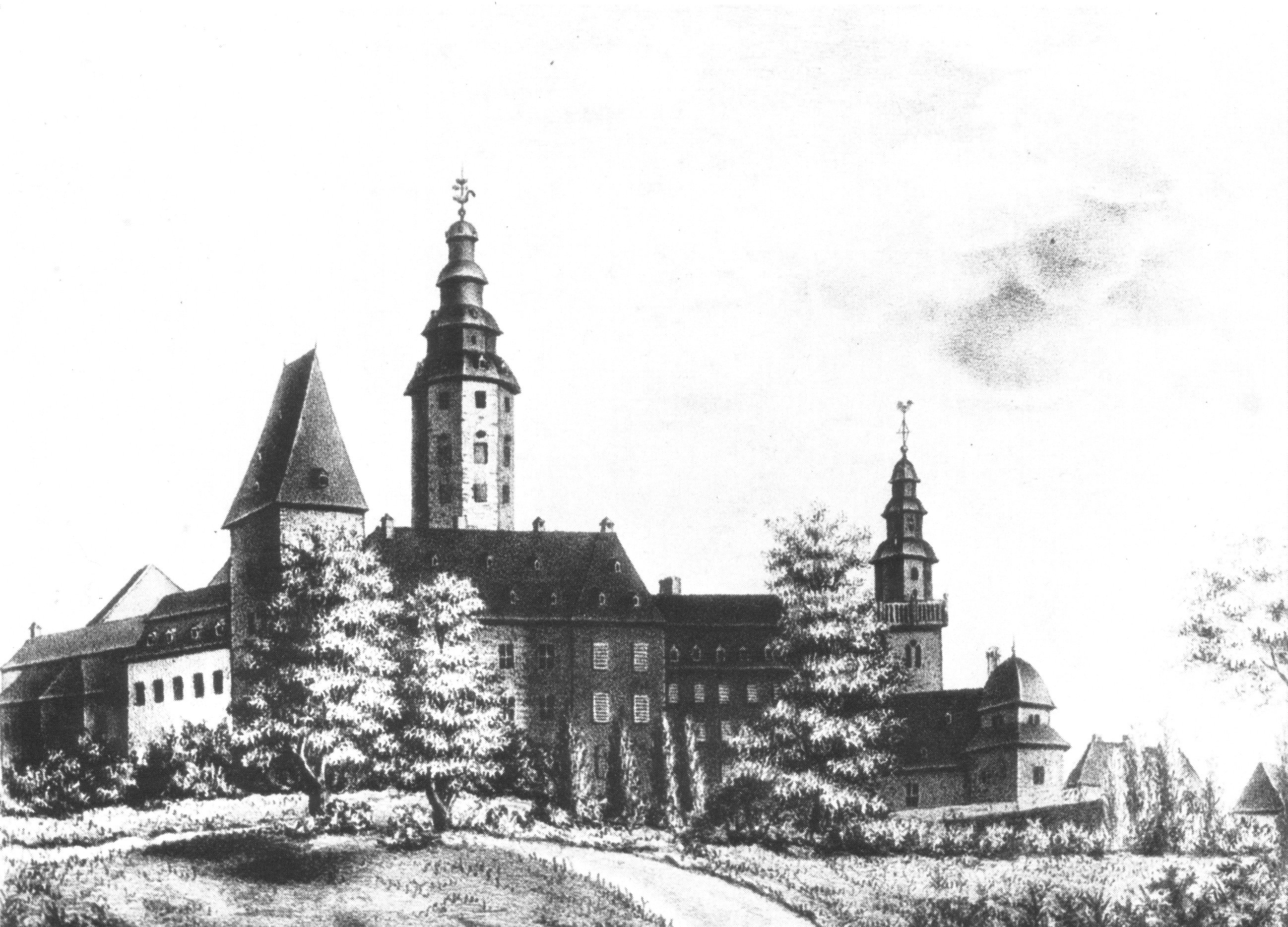 Lithographie "Das alte Schloß in Hanau vor dem Abbruch". Stadtschloss Hanau um 1828 vor Beginn der Abbrucharbeiten. Ansicht von Nordwesten. V.l.n.r. sind folgende Türme zu erkennen: Archiv- oder Taubenturm, Bergfried, Turm der Johanneskirche (heute ohne Turmhaube) und Wasserturm (einziger erhaltener Burgturm).